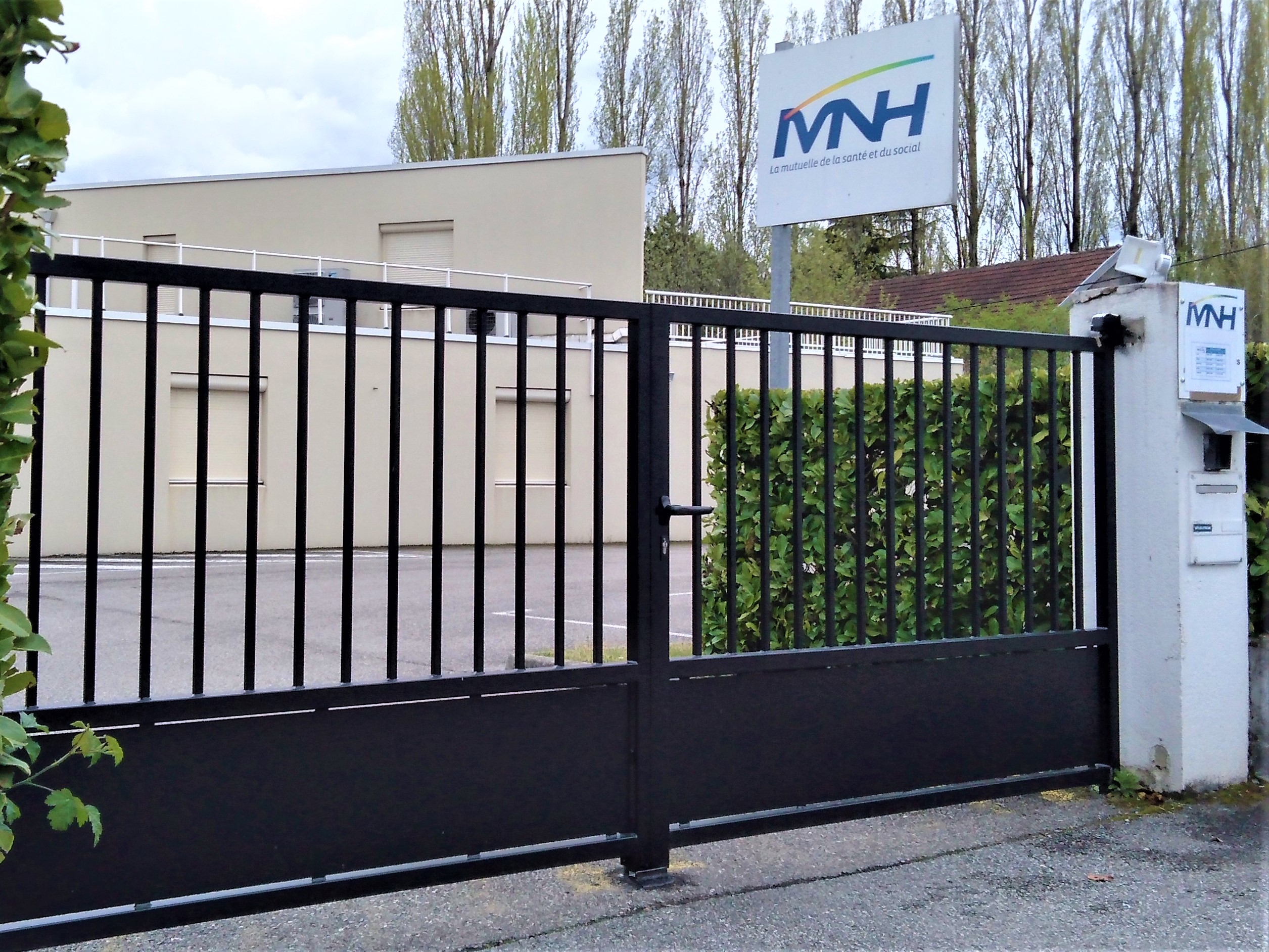 Agence départmentale de la MNH à La Tronche (Isère)